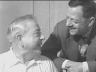 Marcel Duhamel (à droite) et Jacques Prévert affichent leur connivence dans le film Mon frère Jacques par Pierre Prévert